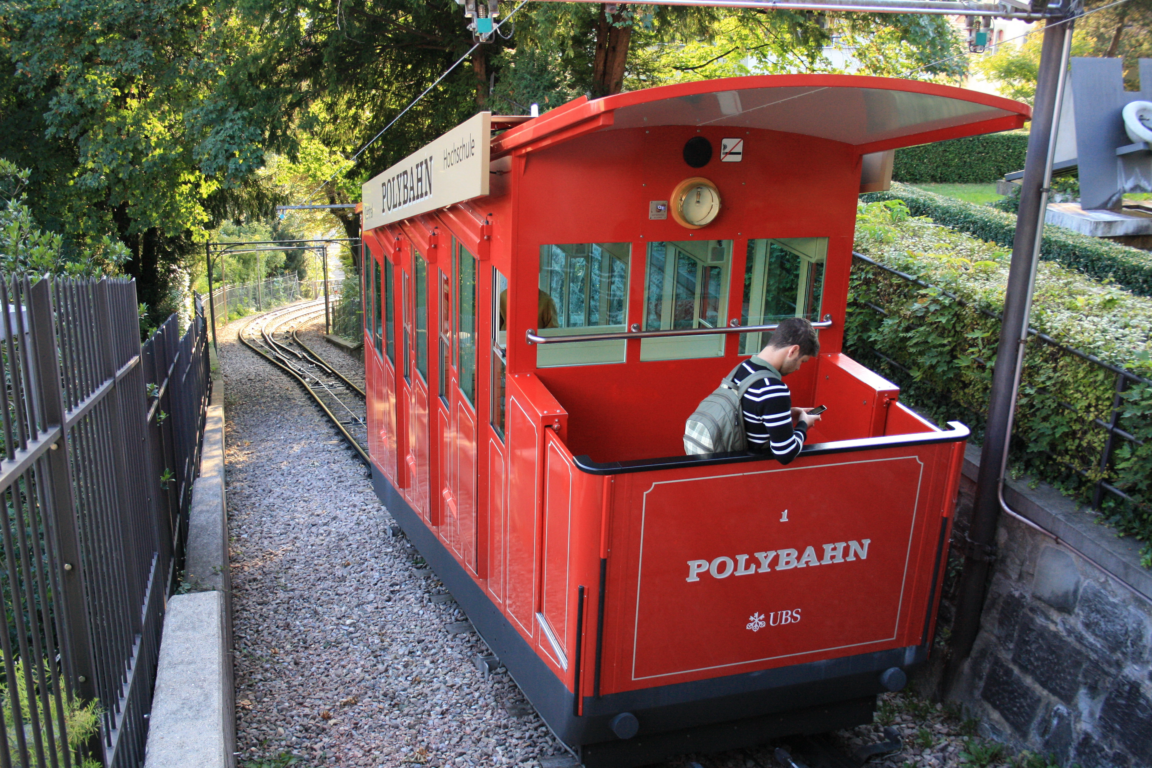 Polybahn in Zürich (Switzerland) near ETH Zurich (Polyterasse) hill station